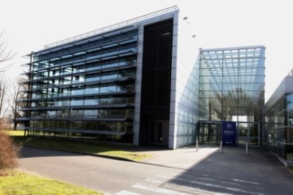 Photos prise par le CEA NeuroSpin de l'entrée du bâtiment.